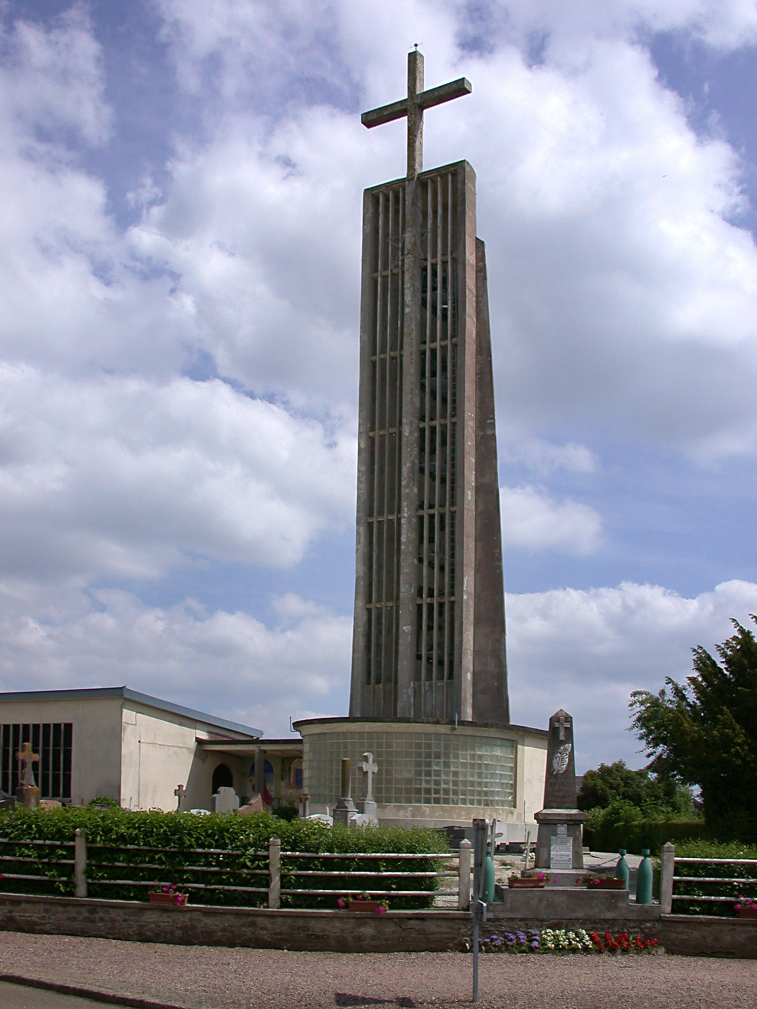 Saint-Germain d'Ectot (Calvados)